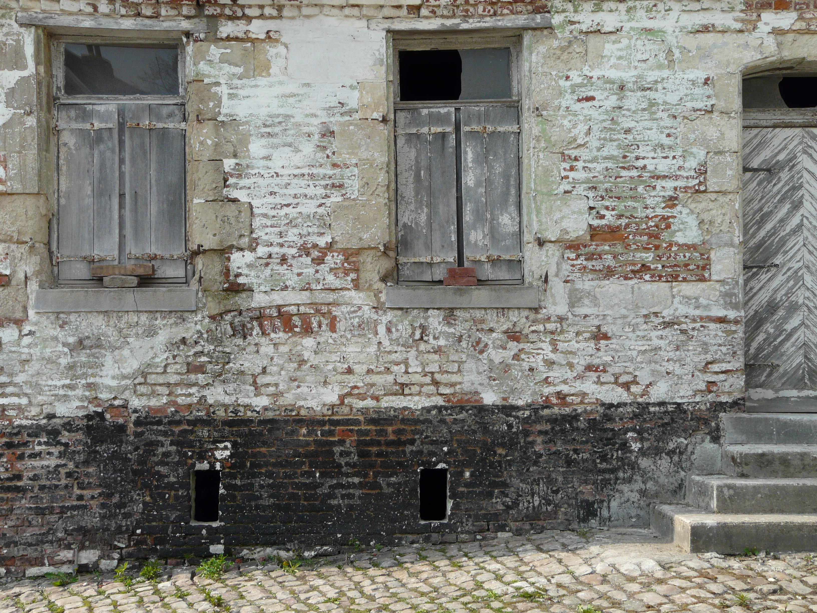 Trcae d'une "blocure" sur le mur d'une maison de mulquinier